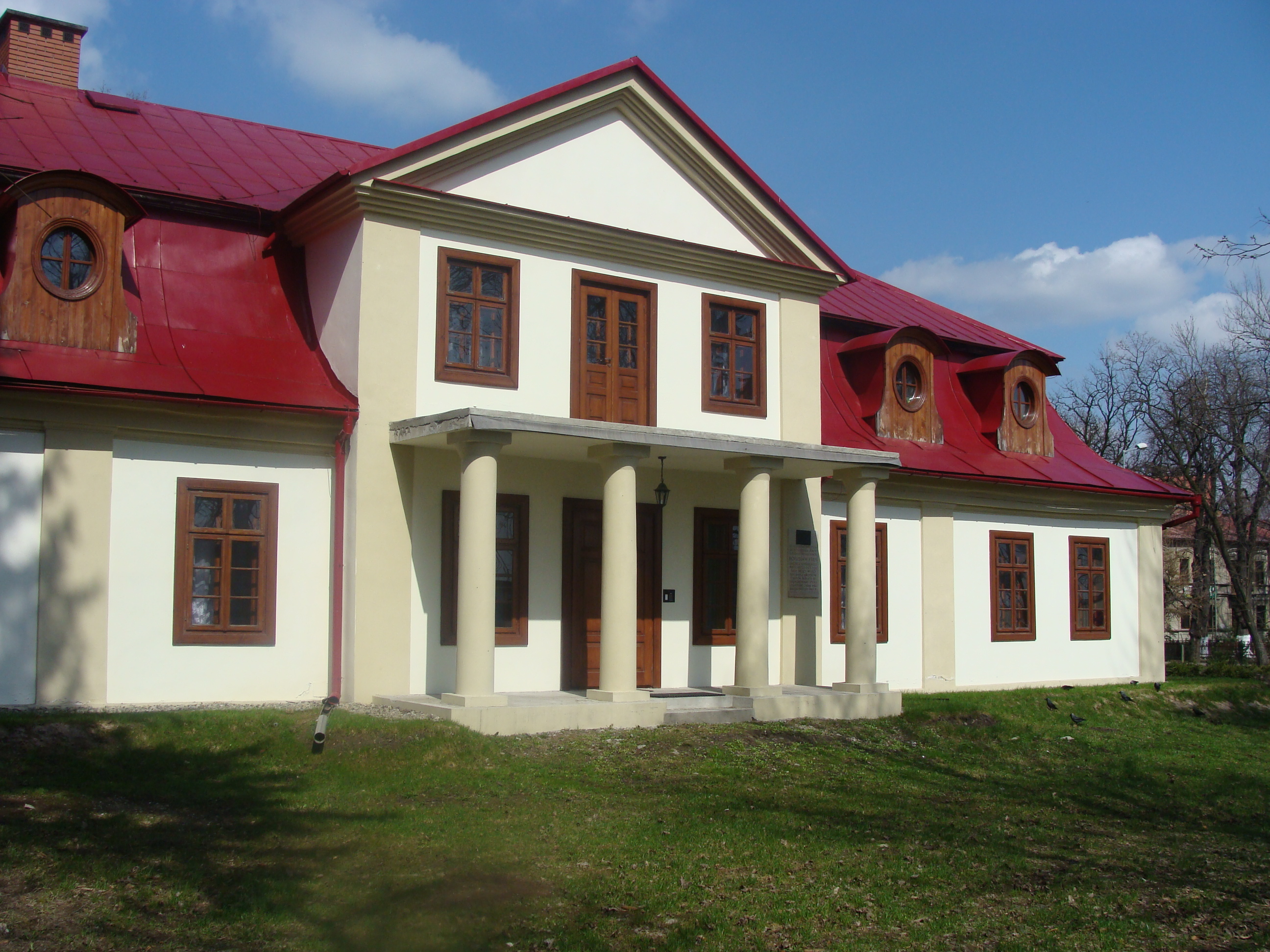 Dom w Hrubieszowie - miejsce urodzin Bolesława Prusa. Obecnie plebania.